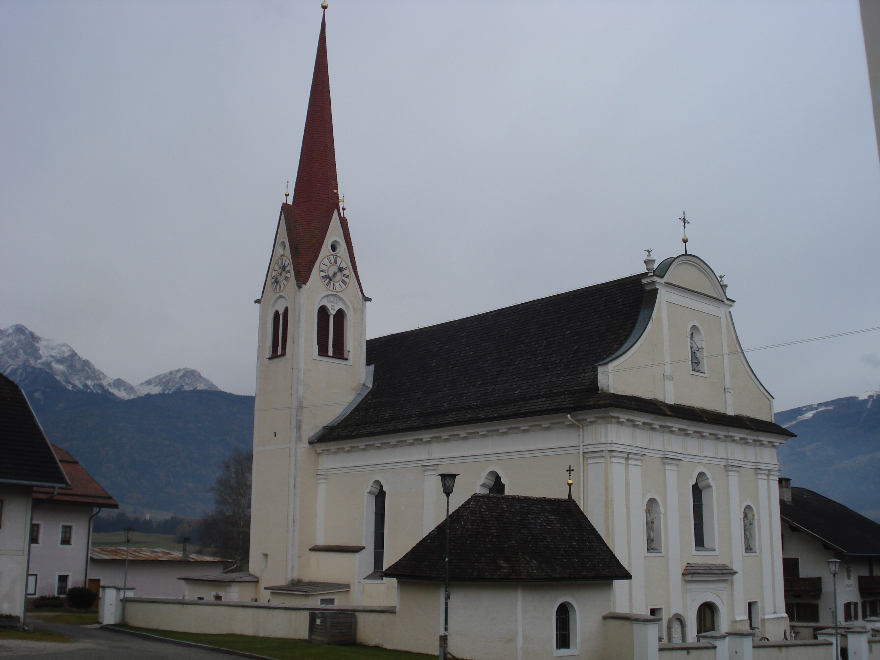 Pfarrkirche von Niederrasen in Südtirol